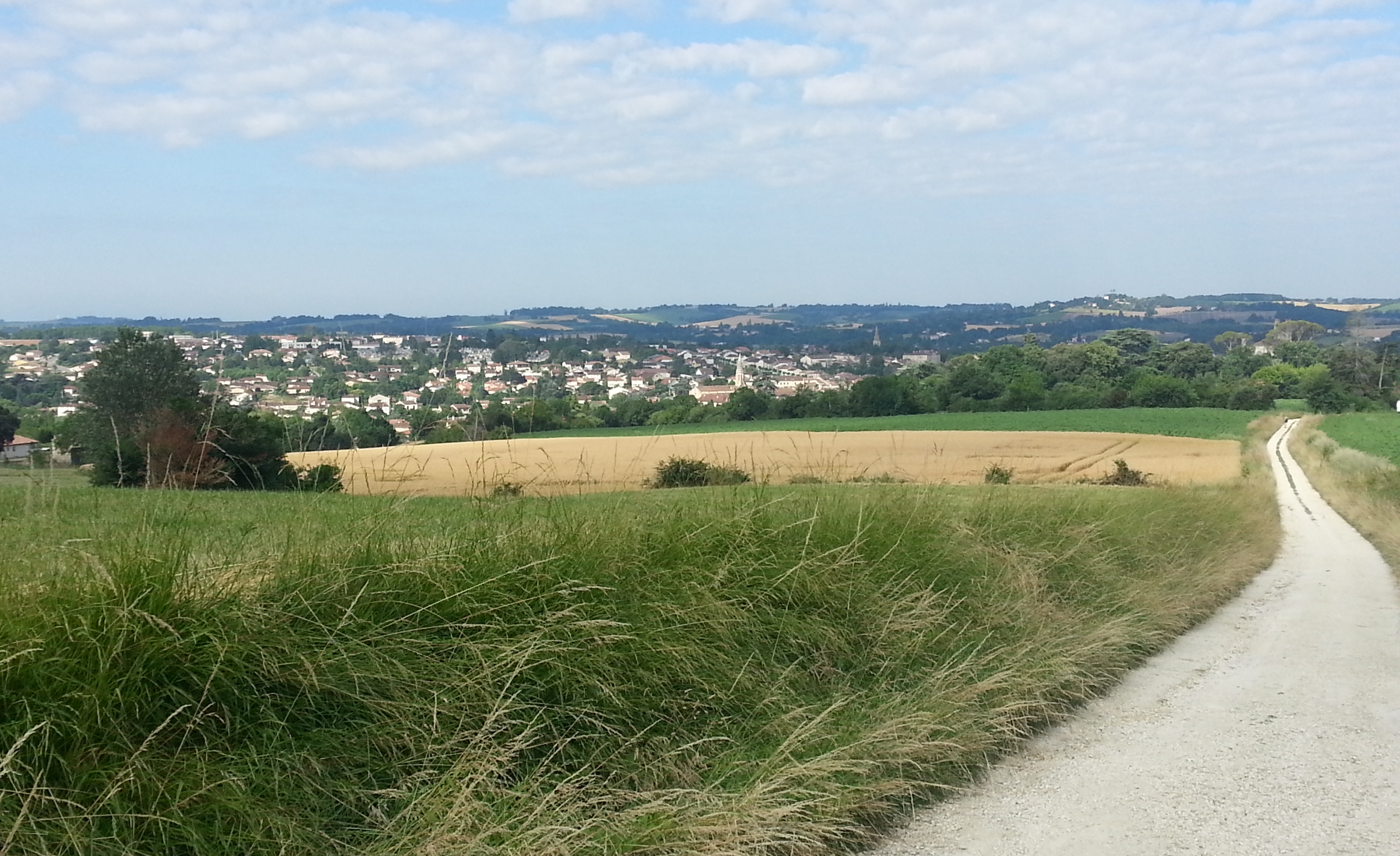 Vue de Condom depuis le Gr 655.